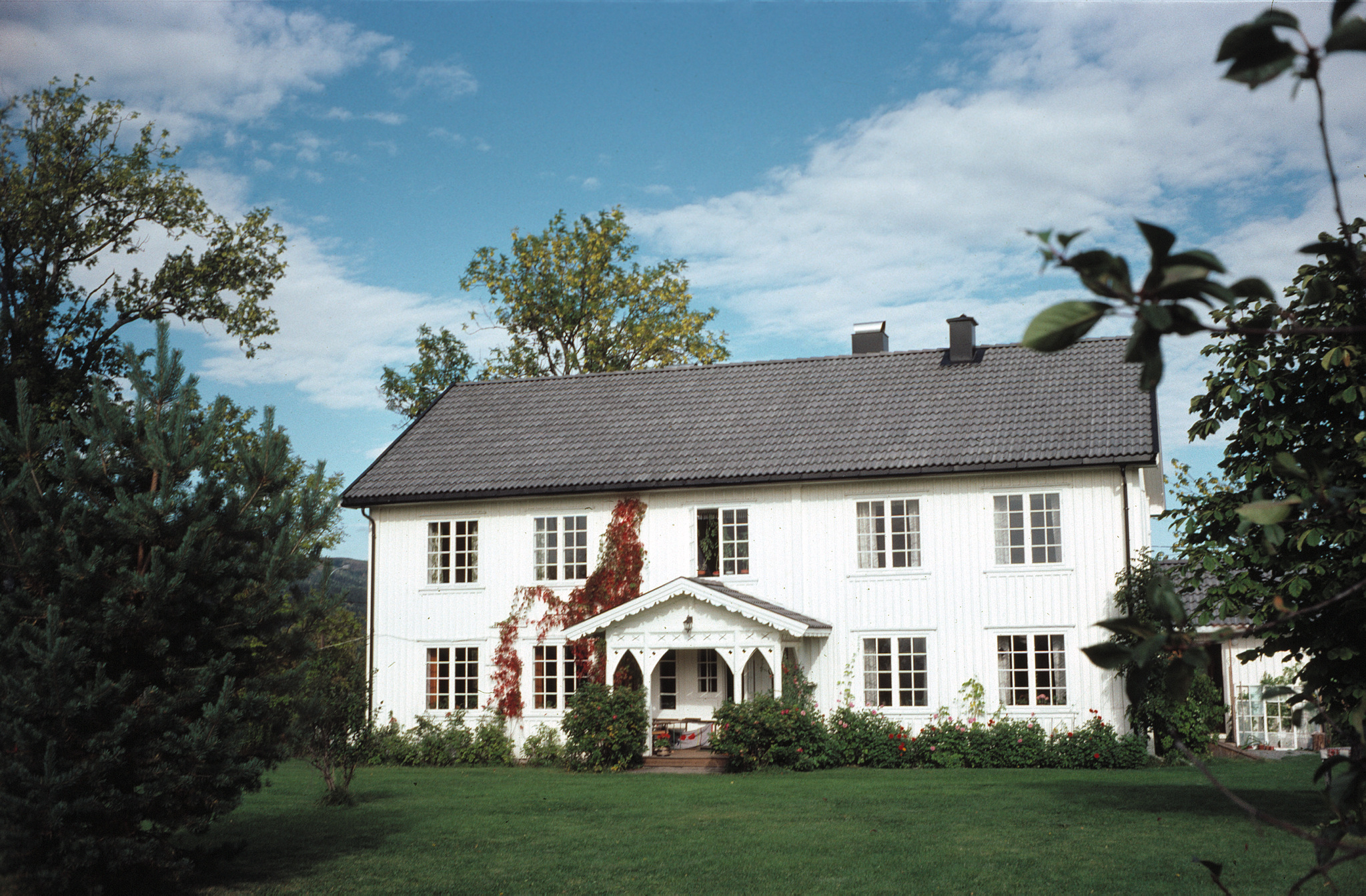 Hovedbygning